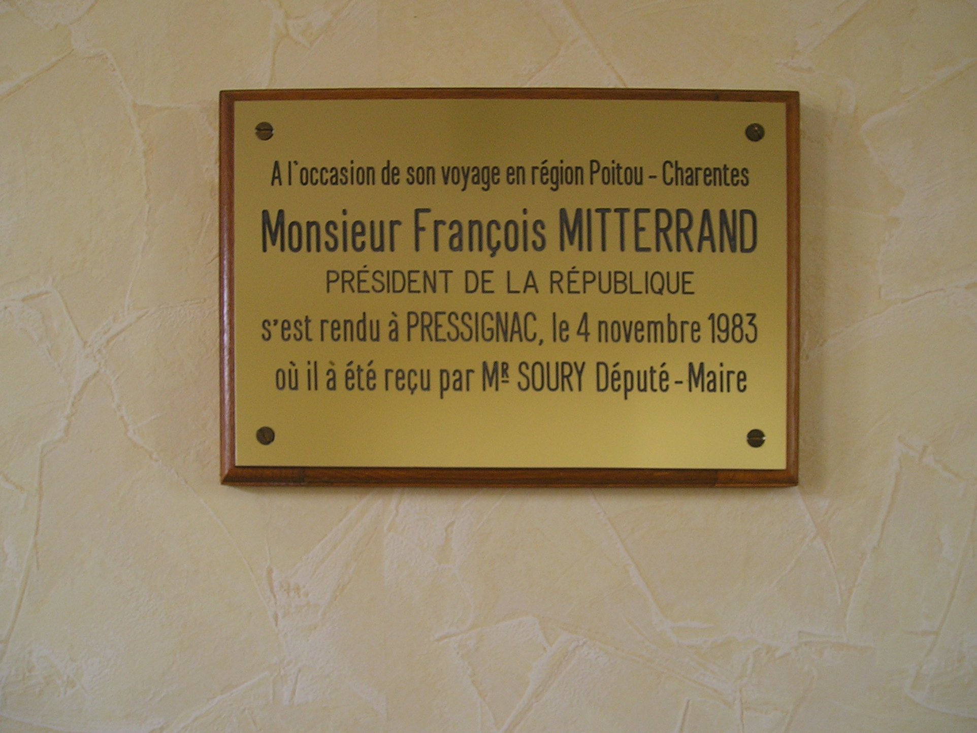 Plaque commémorant le passage de François Miterrand à Pressignac (Charente, France) le 4 novembre 1983.